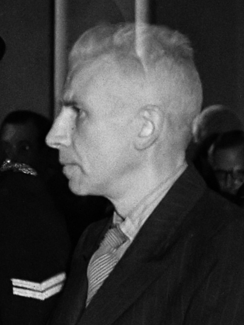 Oorlogsmisdadigers, processen, Van Genechten oktober 1945